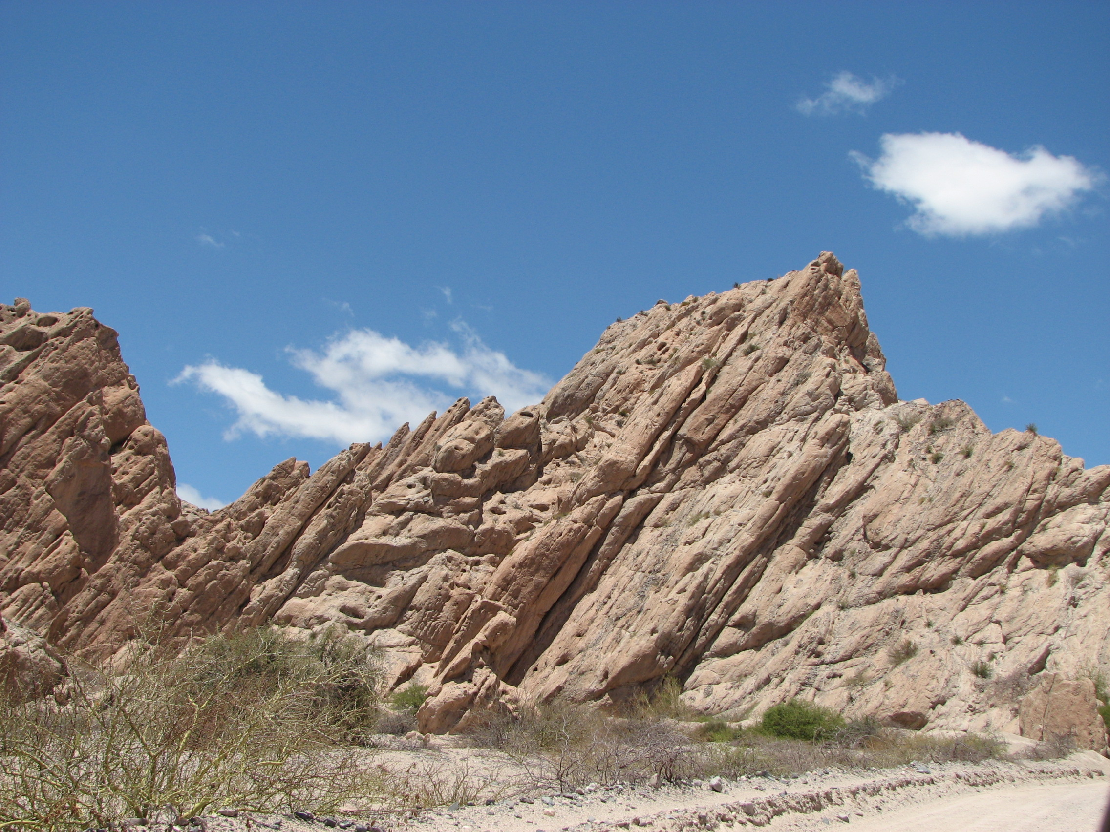 Paysage des vallées Calchaquies, près d'Angastaco